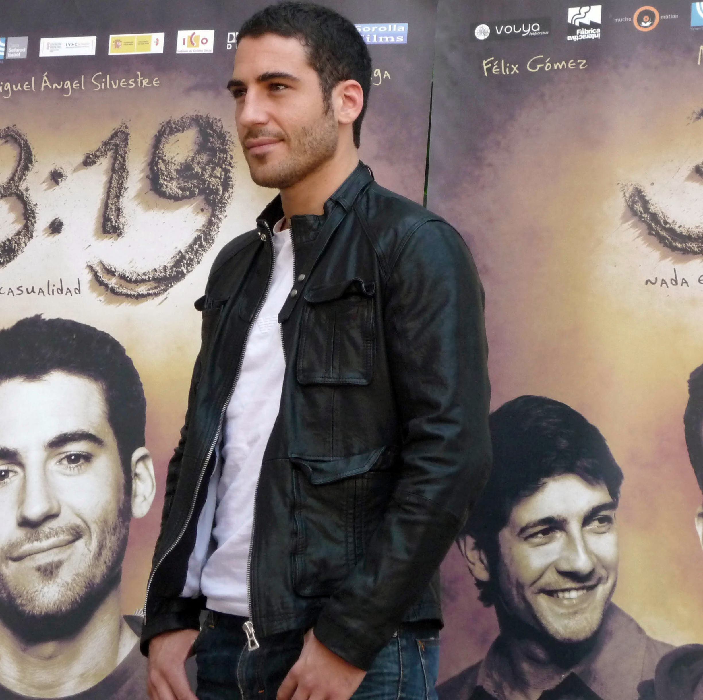 Miguel Ángel Silvestre en la presentación de 3:19